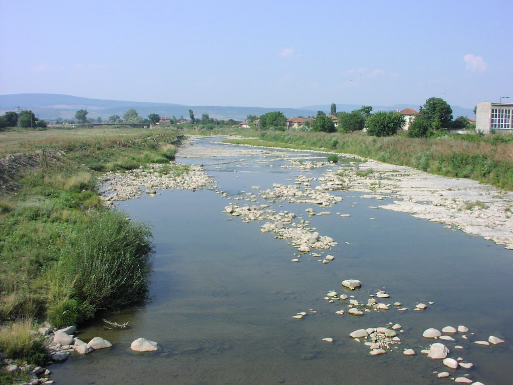 Zlataritsa, Veliko Tarnovo, Bulgaria - the Zlataritza river.